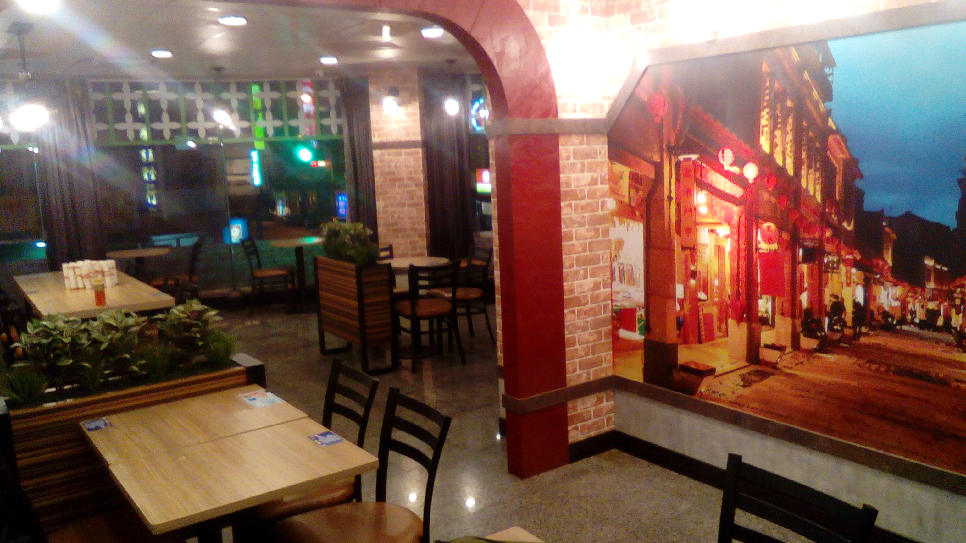 屏東縣里港鄉中山路46號 統一超商里港門市2樓藝廊